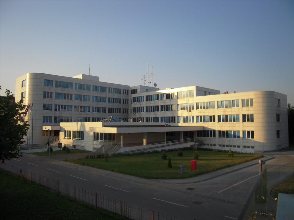 Zgrada_MUPa_Republike_Srpske